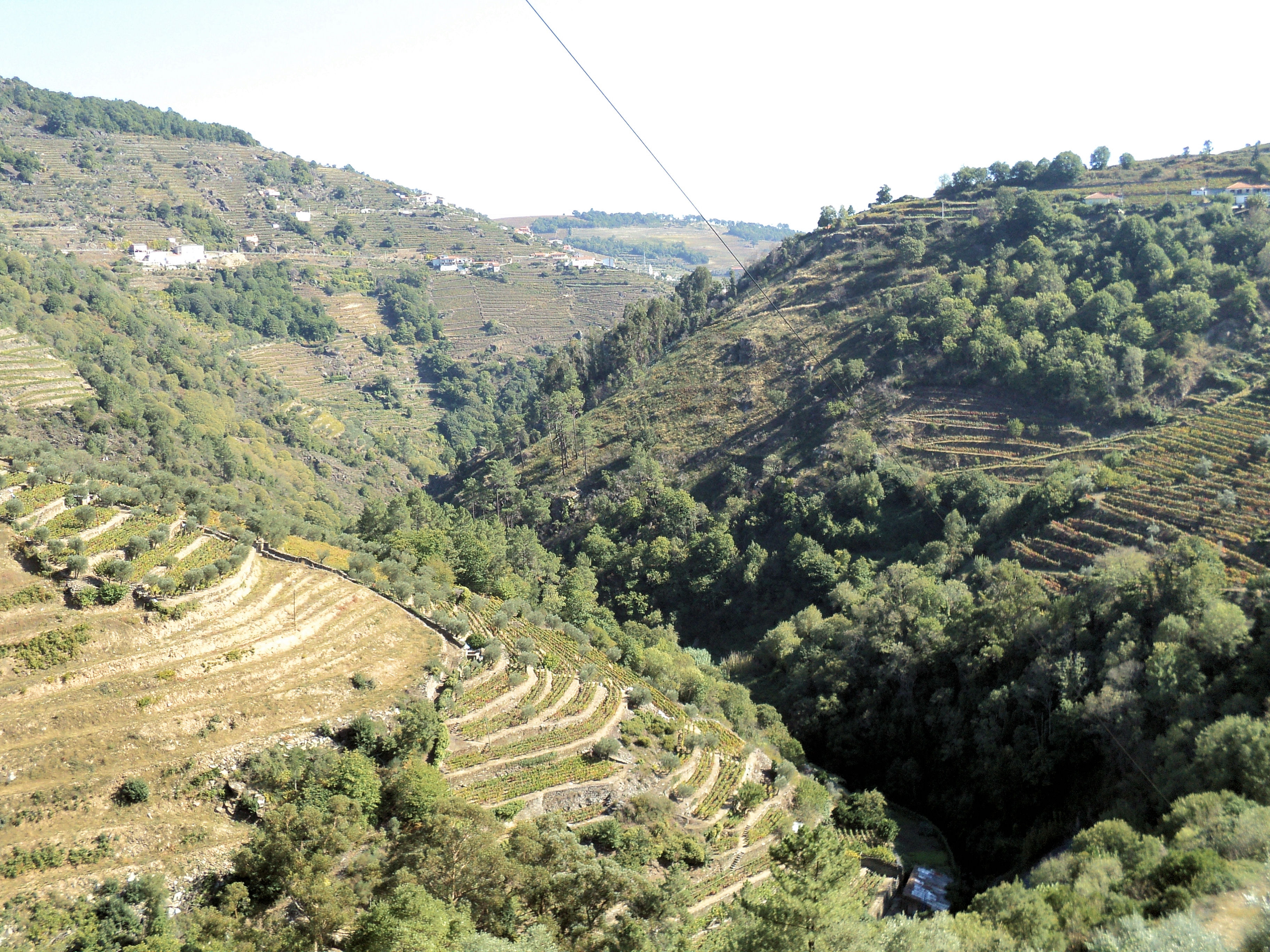 Vale do rio Sermanha - Boavista, Vila Marim